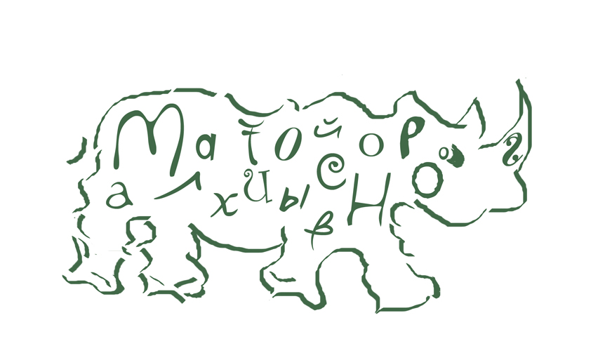 Емблема конкурсу. Художник Марина Акімова